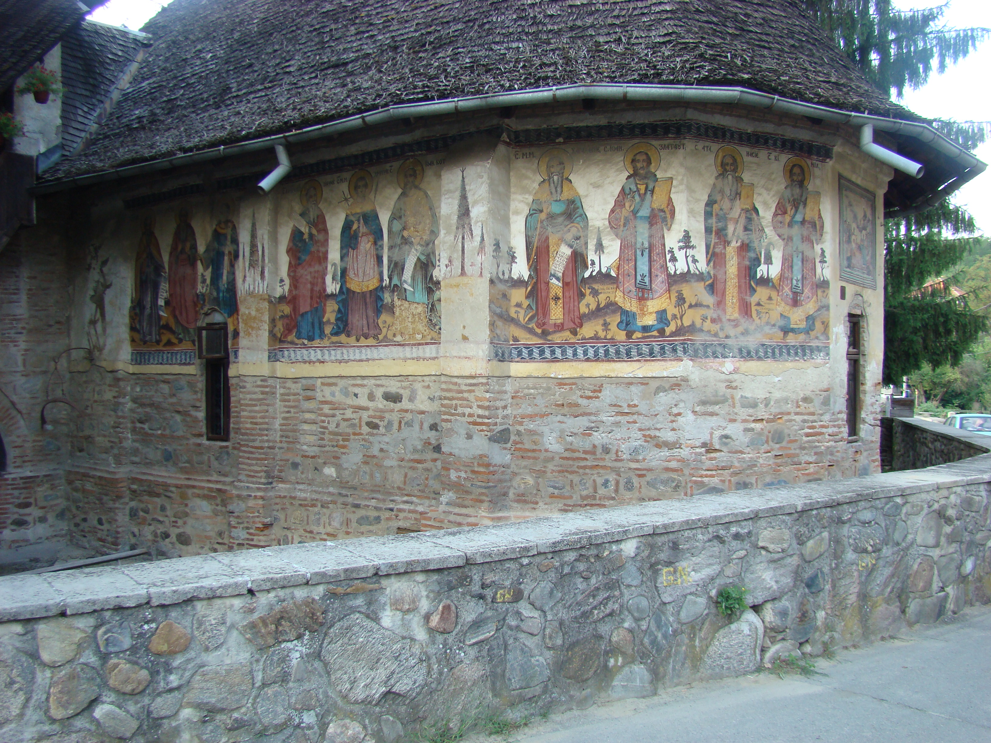 Biserica "Adormirea Maicii Domnului" - Olari, municipiul Curtea de Argeș, str. Cuza Vodă 134